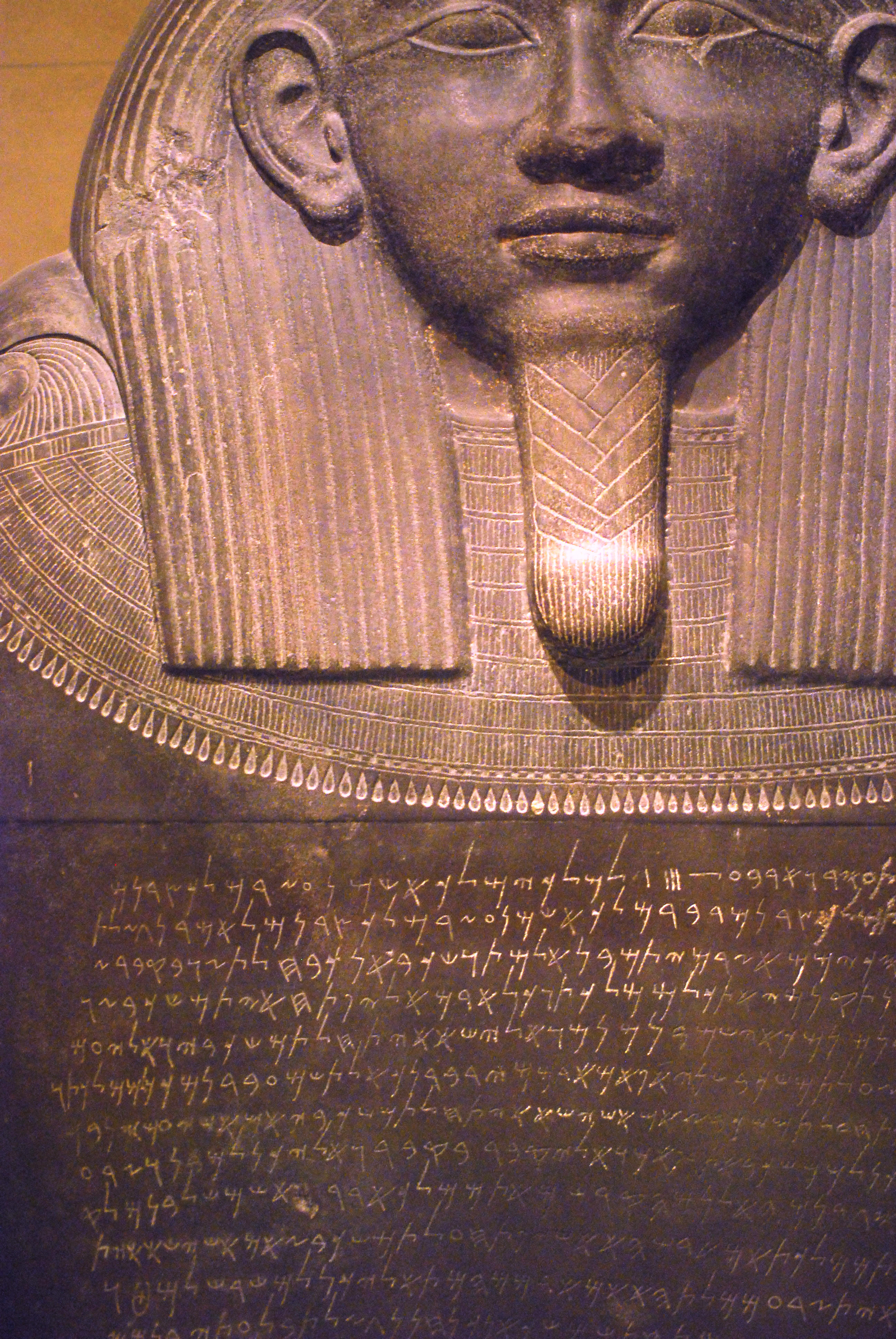 Sarcophage d'Eshmunazor II, roi de Sidon. Premier quart du Ve siècle avant J.-C. Nécropole de Magharat Tablun (caverne d'Apollon), Saïda, ancienne Sidon (Liban). Département des Antiquités orientales. Salle 17a. AO 4806. Louvre. Sarcophage de facture égyptienne. Le roi porte les attributs de la royauté en Égypte : le némes (coiffure), la fausse barbe ; il est paré d'un pectoral dont les extrémités sont ornées de têtes de faucon. Le couvercle porte la plus longue inscription phénicienne d'époque perse connue. Louvre.fr